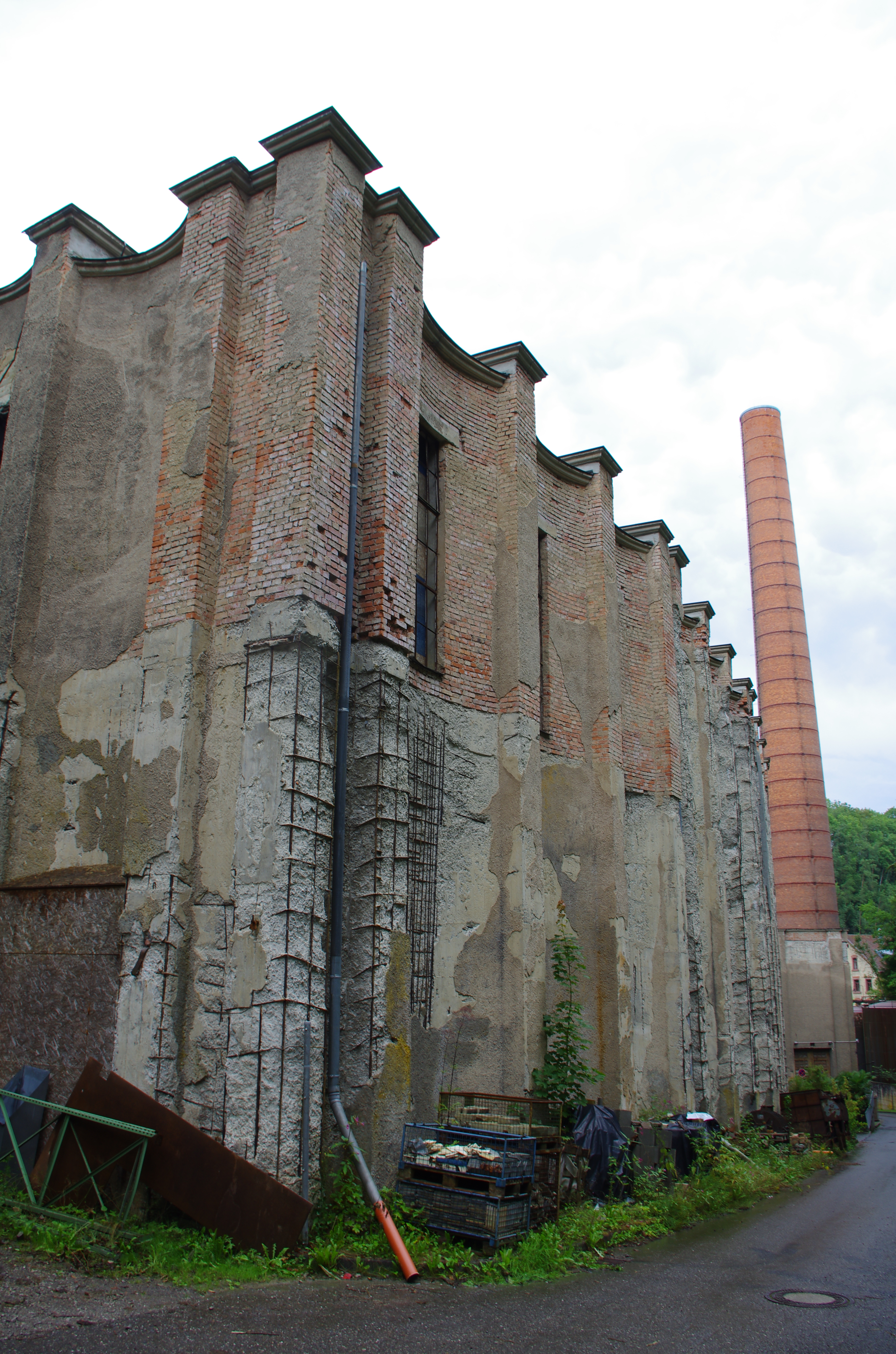 Kraftwerk Rottweil, Neckartal 68, Rottweil, Baden-Württemberg, Deutschland